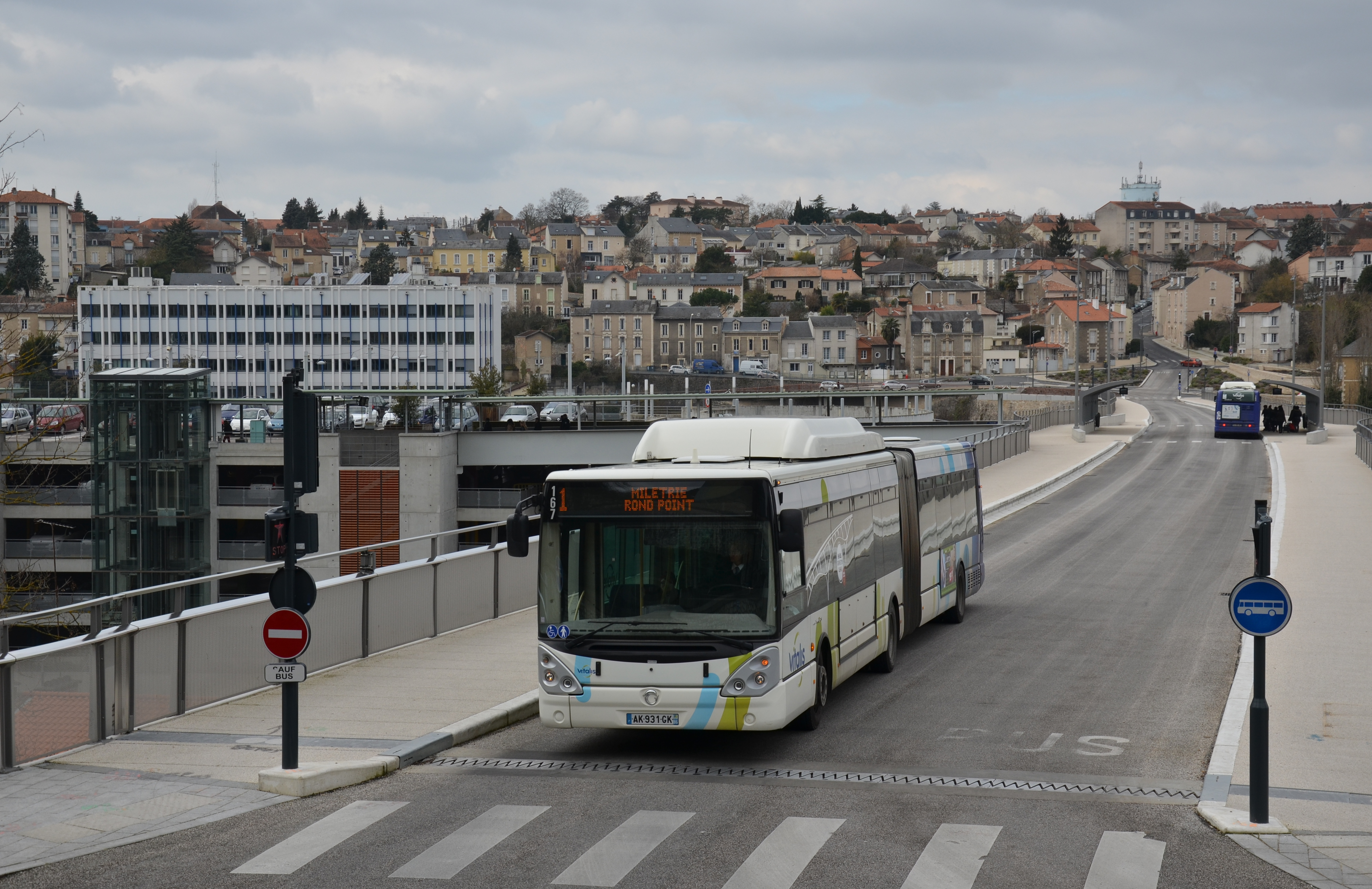 Irisbus Citelis 18 n°167 sur le viaduc Léon-Blum de Poitiers, près de la gare SNCF.